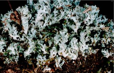 Cladonia caespiticia